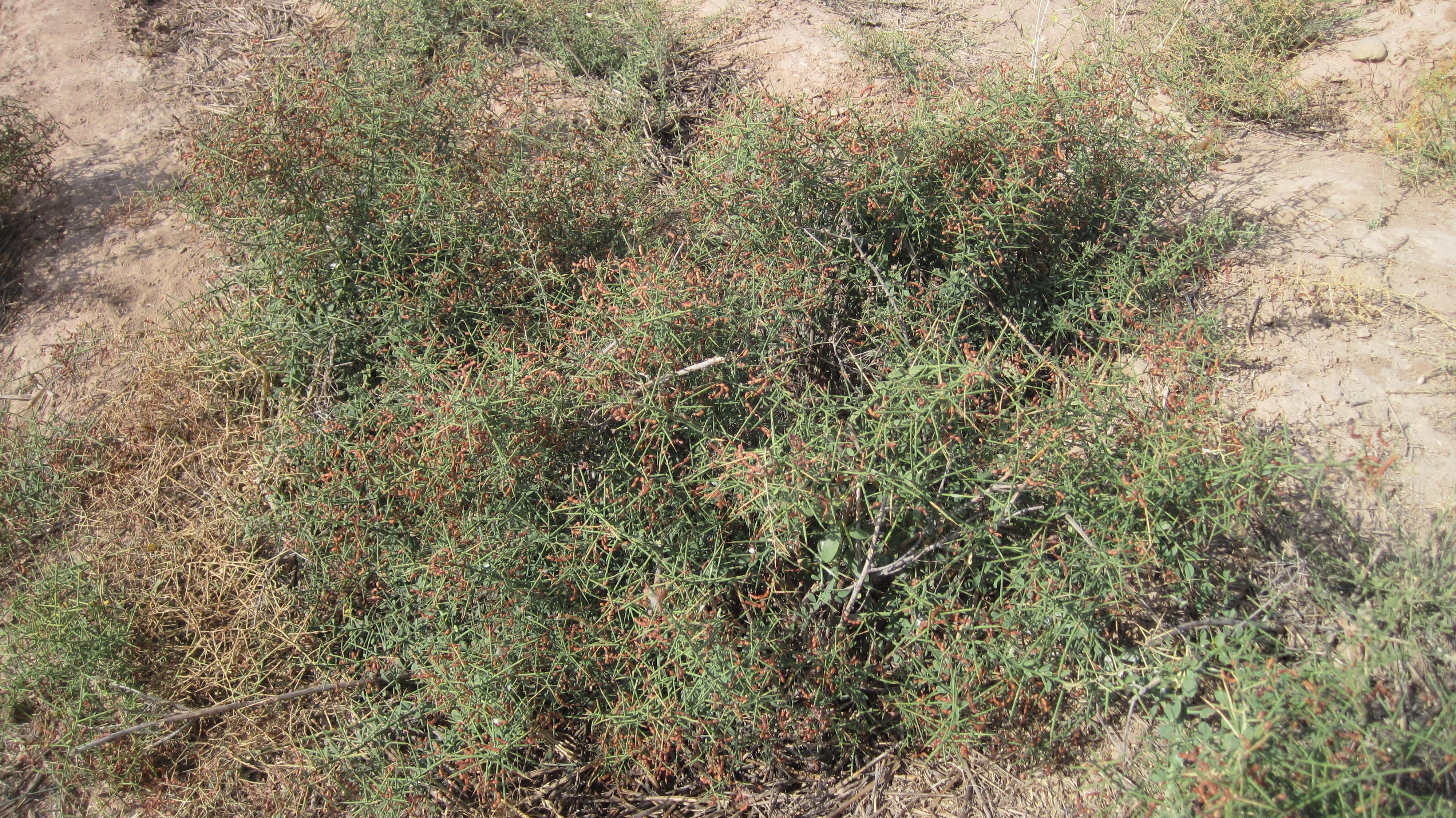 این عکس مربوط به گیاه ترنجبین از پوشش گیاهی روستای زالی است که توسط احمد نیک گفتار در آبان ماه 1391 تهیه گردیده است.